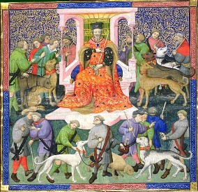 detail: Livre de Chasse